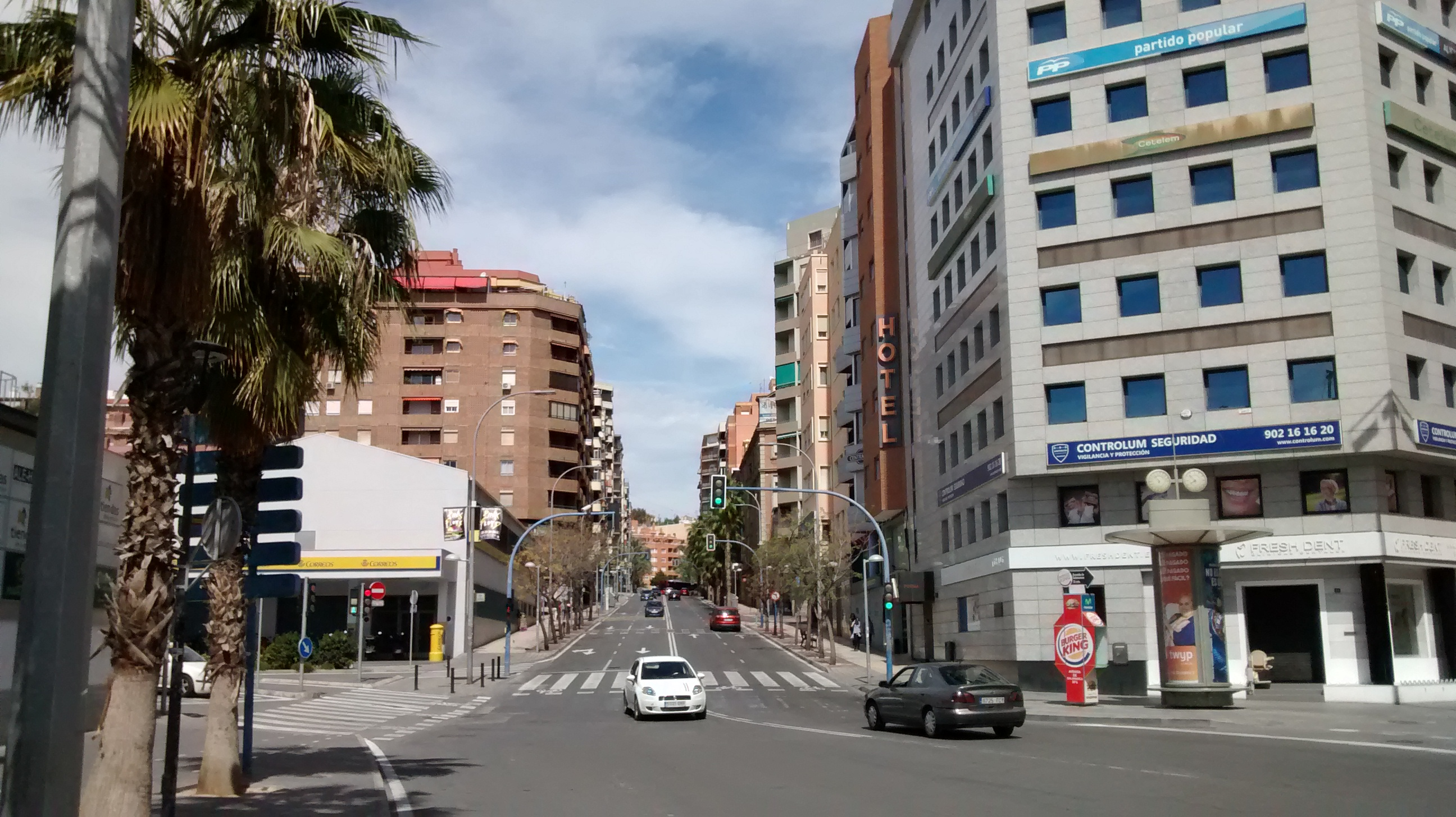 Céntrica avenida de la ciudad de Alicante, Spain